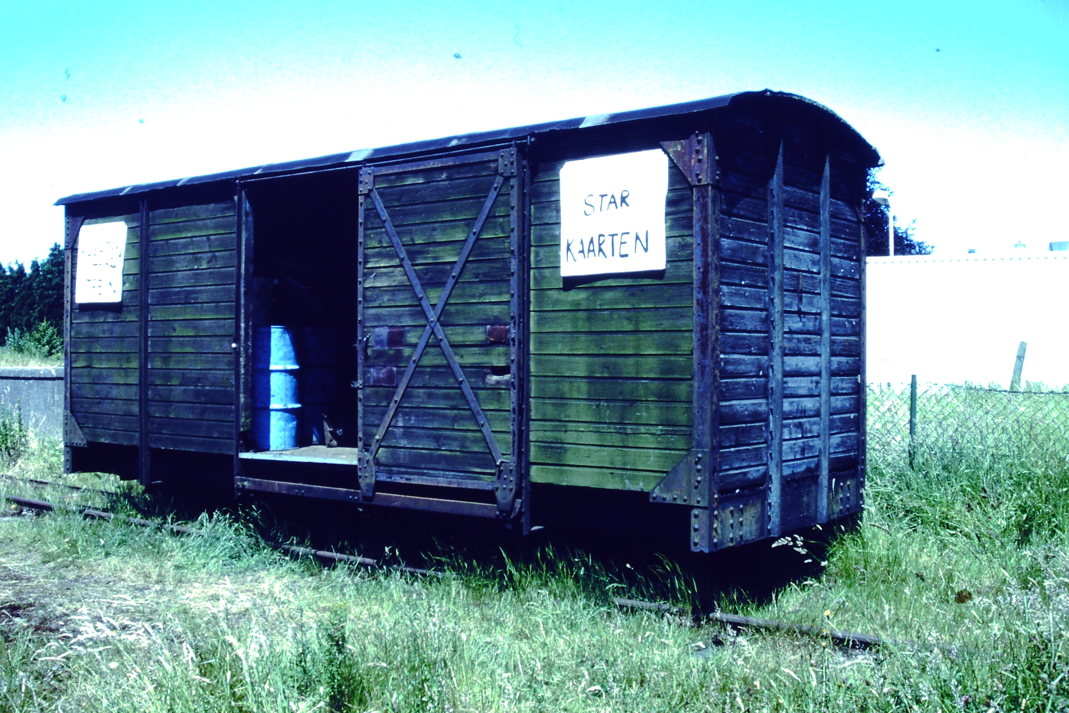 Eerste Drentsche Stoomtramweg-Maatschappij (EDS) gesloten goederenwagen 85 gebouwd door Noord Nederlandse Machinefabriek te Winschoten als opslagruimte bij Stichting Stadskanaal Rail te Stadskanaal. [1]